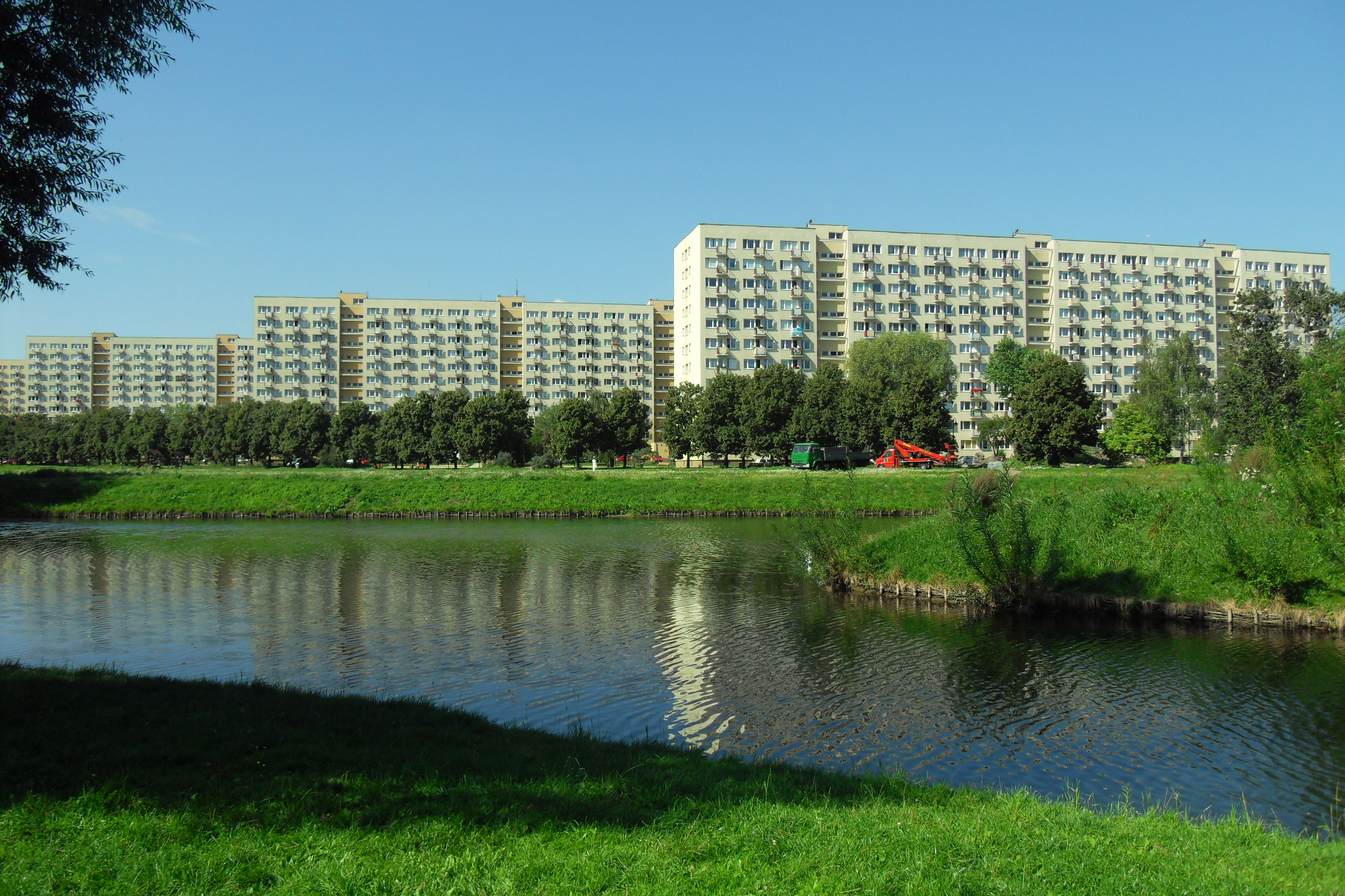 Gdańsk Żabianka. Potok Oliwski (zbiornik retencyjny "Chłopska") i ul. Pomorska, bloki od prawej: 82, 86 i 90.